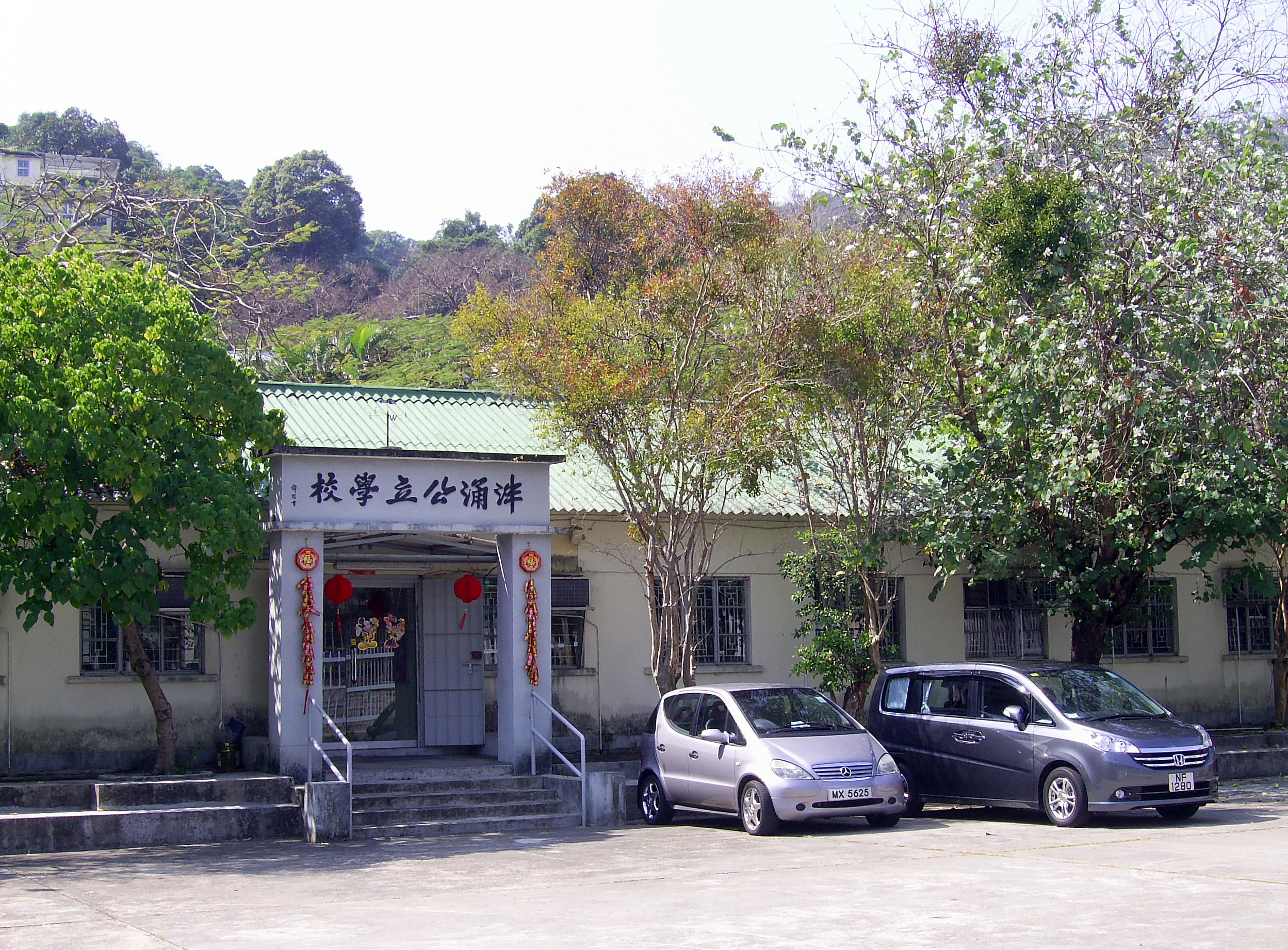 中文（香港）: 泮涌公立學校